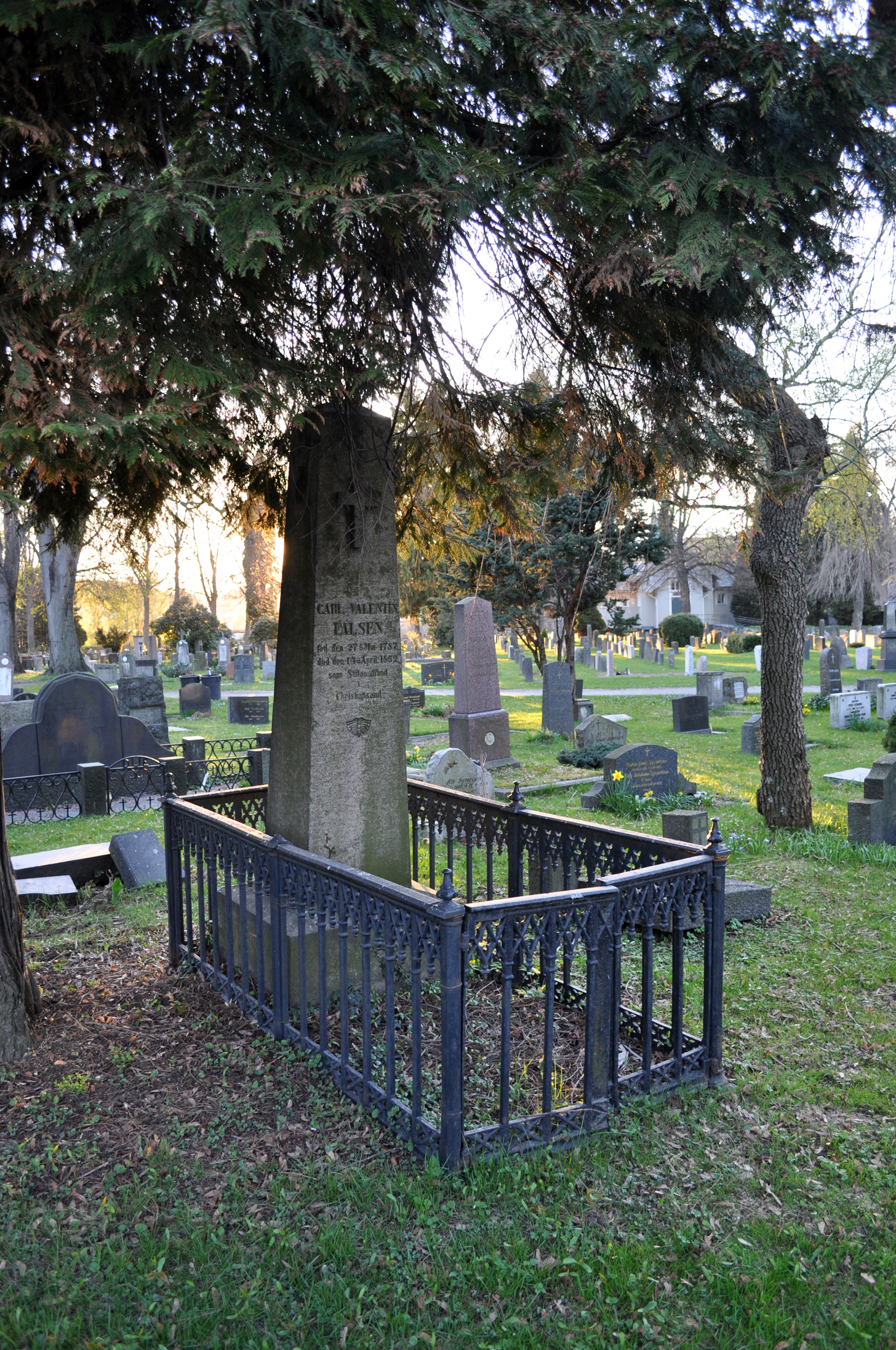 Norsk (bokmål): Kristiansand kirkegård